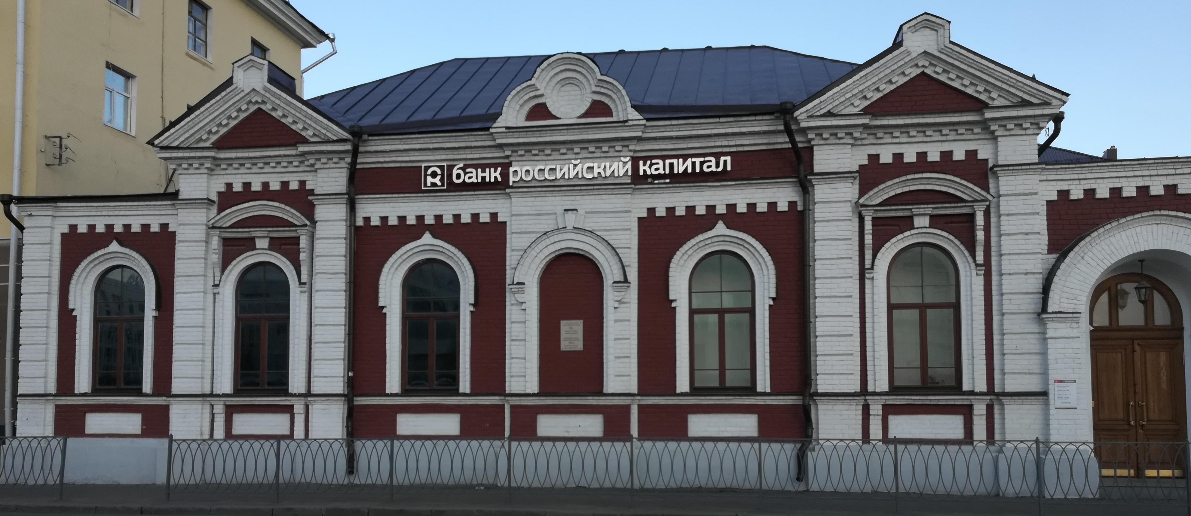 Университетская улица в Казани